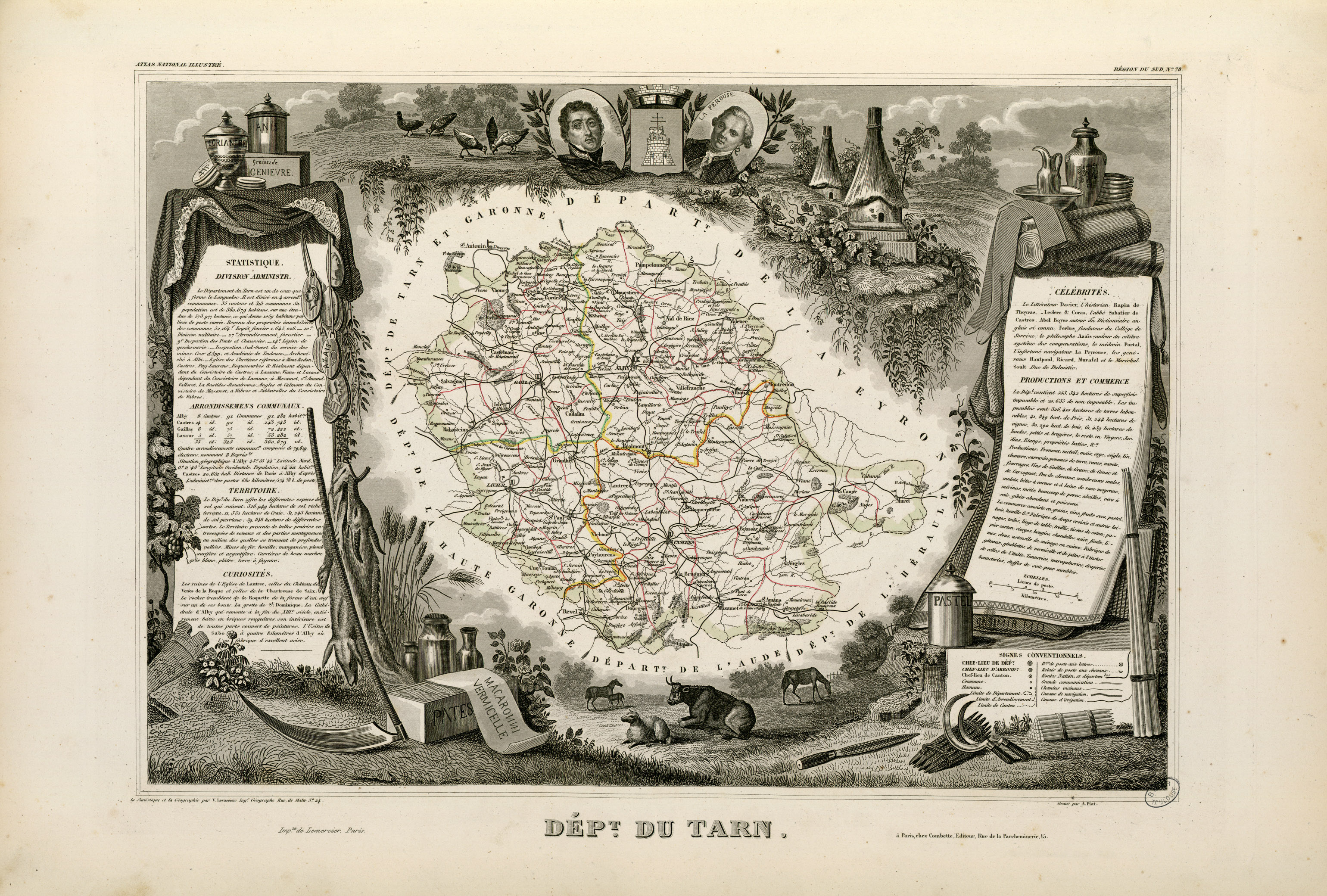 Titre complet du recueil : Atlas national illustré des 86 Départements et des Possessions de la France divisé par Arrondissements, Cantons et Communes avec le tracé de toutes les routes, chemins de fer et canaux. Dressé d'après les Travaux du Cadastre du Dépôt de la Guerre et des Ponts et Chaussées par V. Levasseur, Ingénieur Géographe attaché au Génie du Cadastre et de la Ville de Paris. Gravé sur acier par les meilleurs artistes. Imprimerie de Lemercier à Paris ou imprimerie Dupuich à Paris. Page de titre et 100 pl. en n. et b. et en coul. dont un tableau statistique et 2 cartes dépliantes. Ancely, René (1876 - 1966). Possesseur